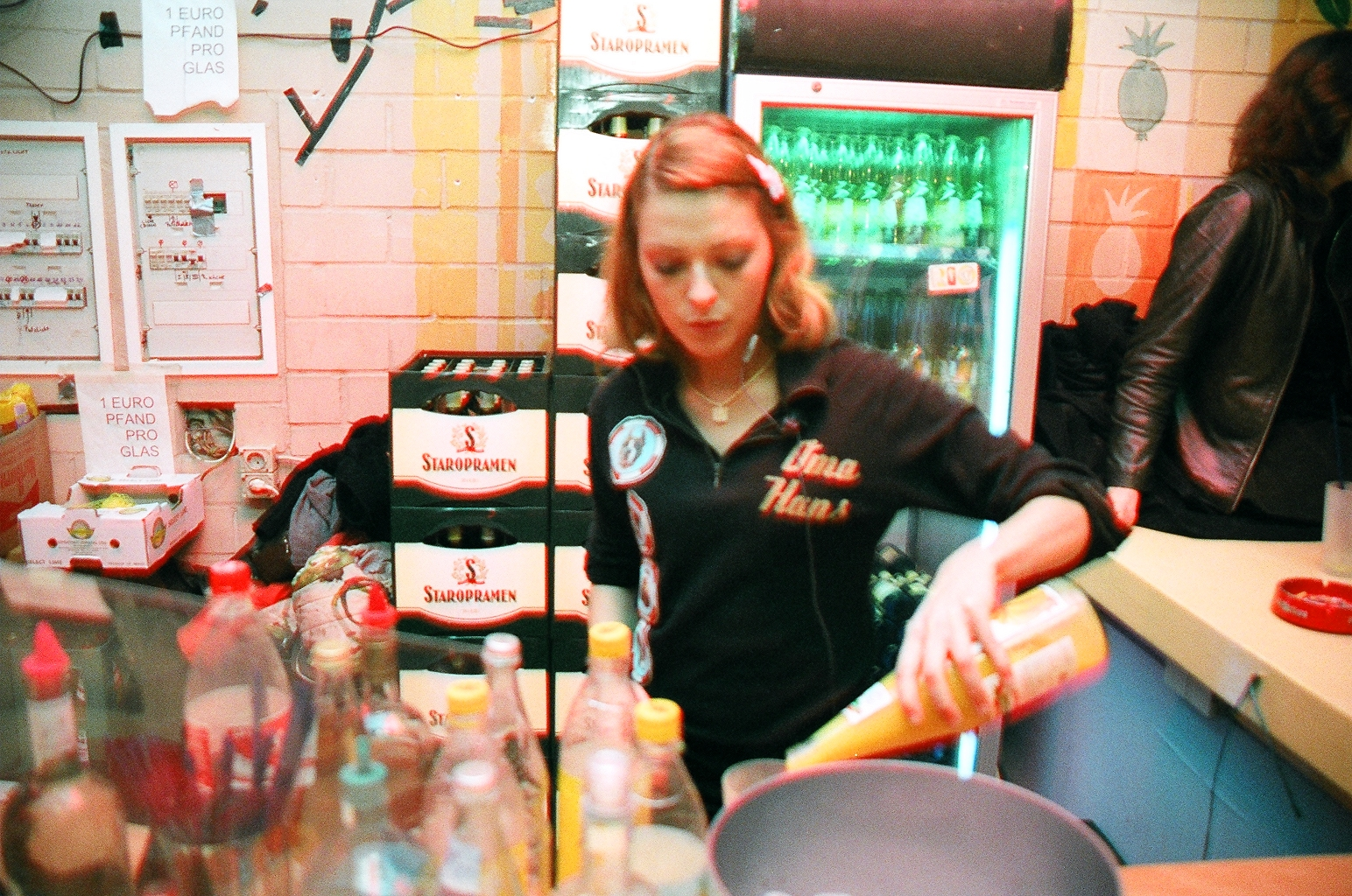 Bartendress in Berlin Discotheque